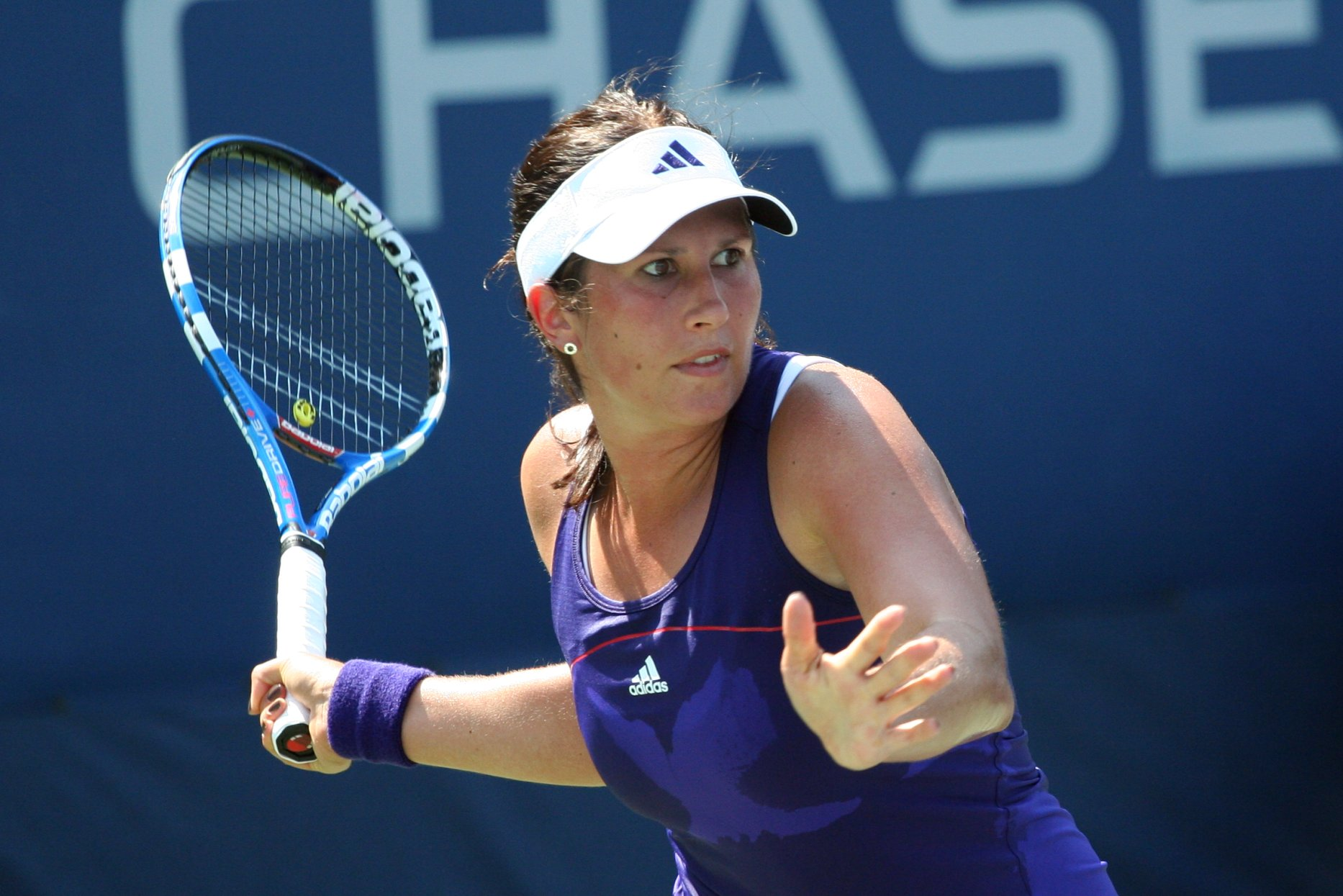 U.S. Open Aug. 31, 2010